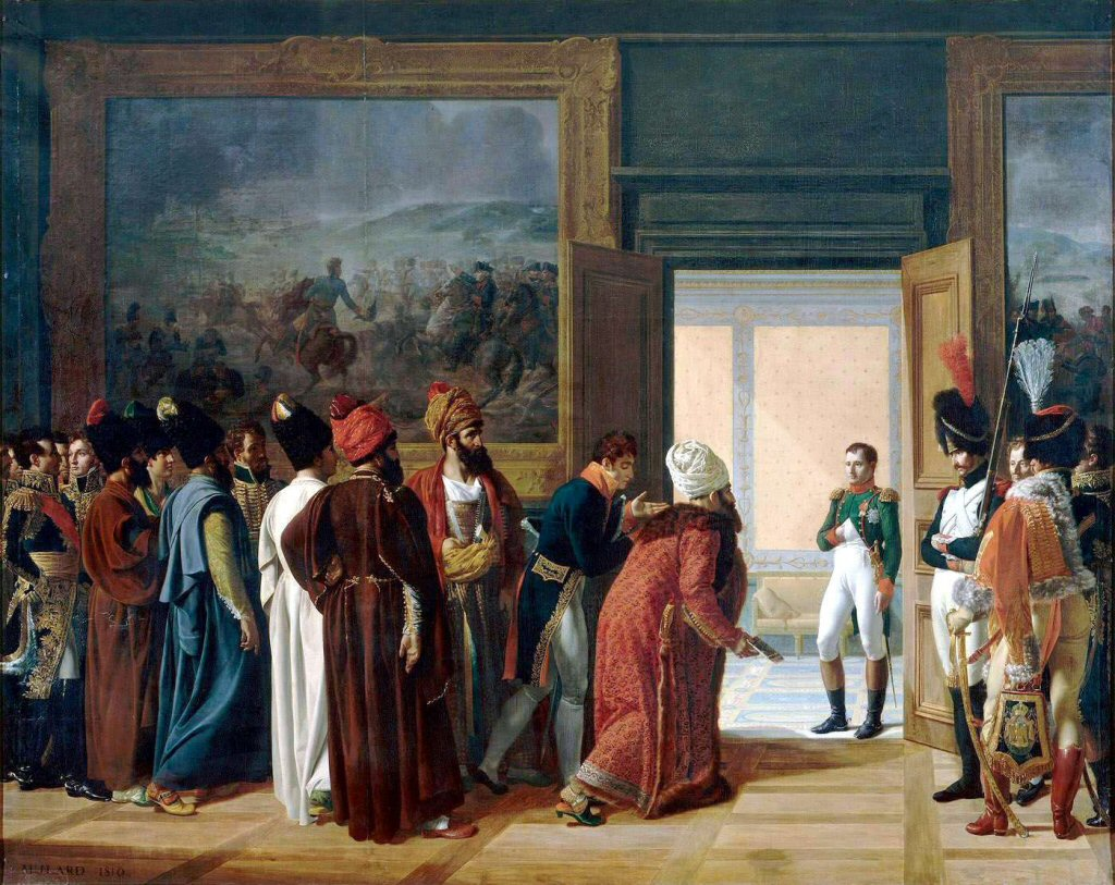 Napoléon reçoit Reza Bey l’ambassadeur de Perse au château de Finkenstein.